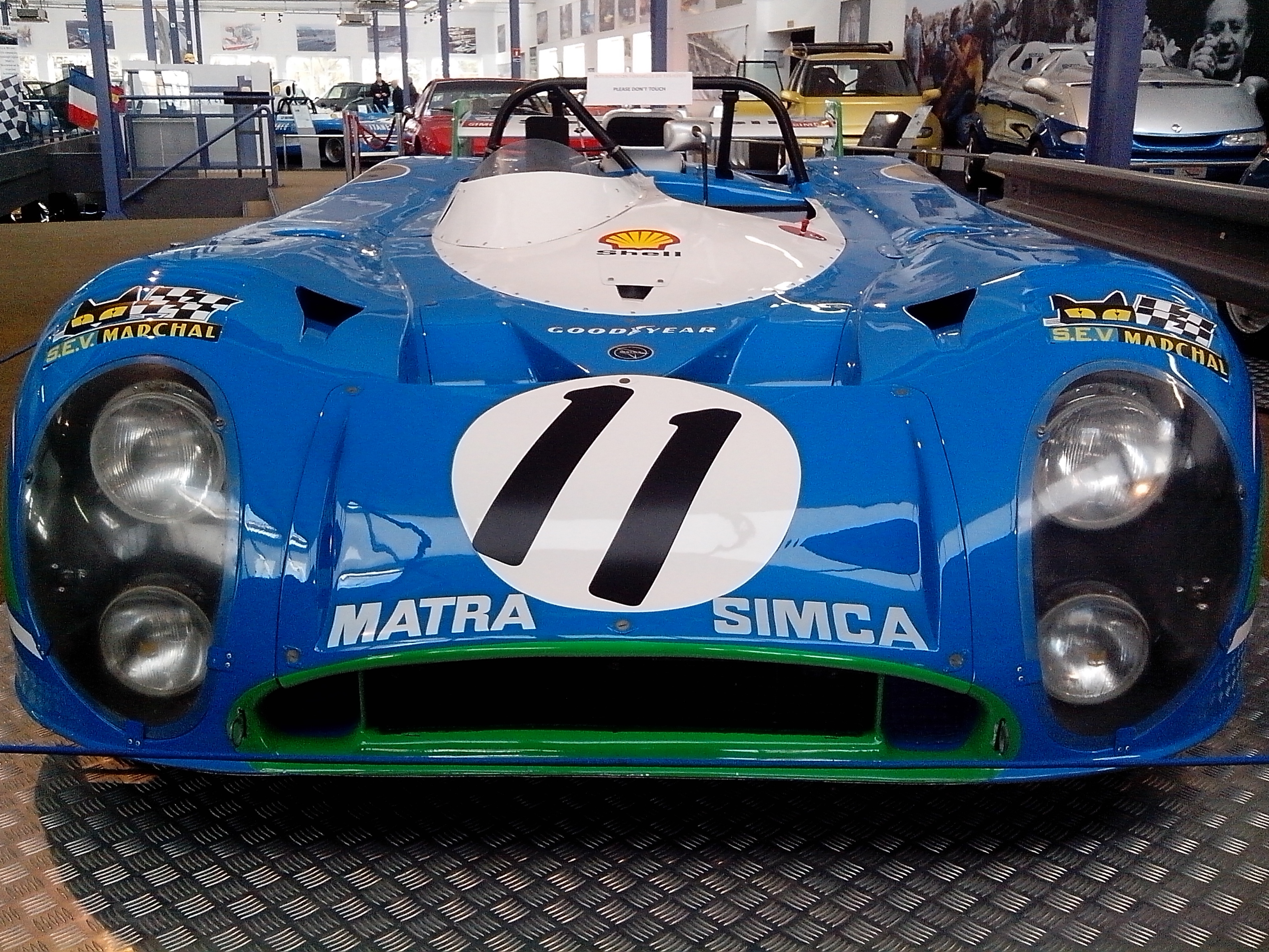 Collection de l'Espace Automobiles Matra